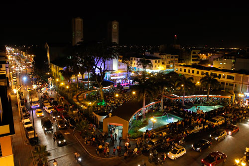 Ciudad de babahoyo